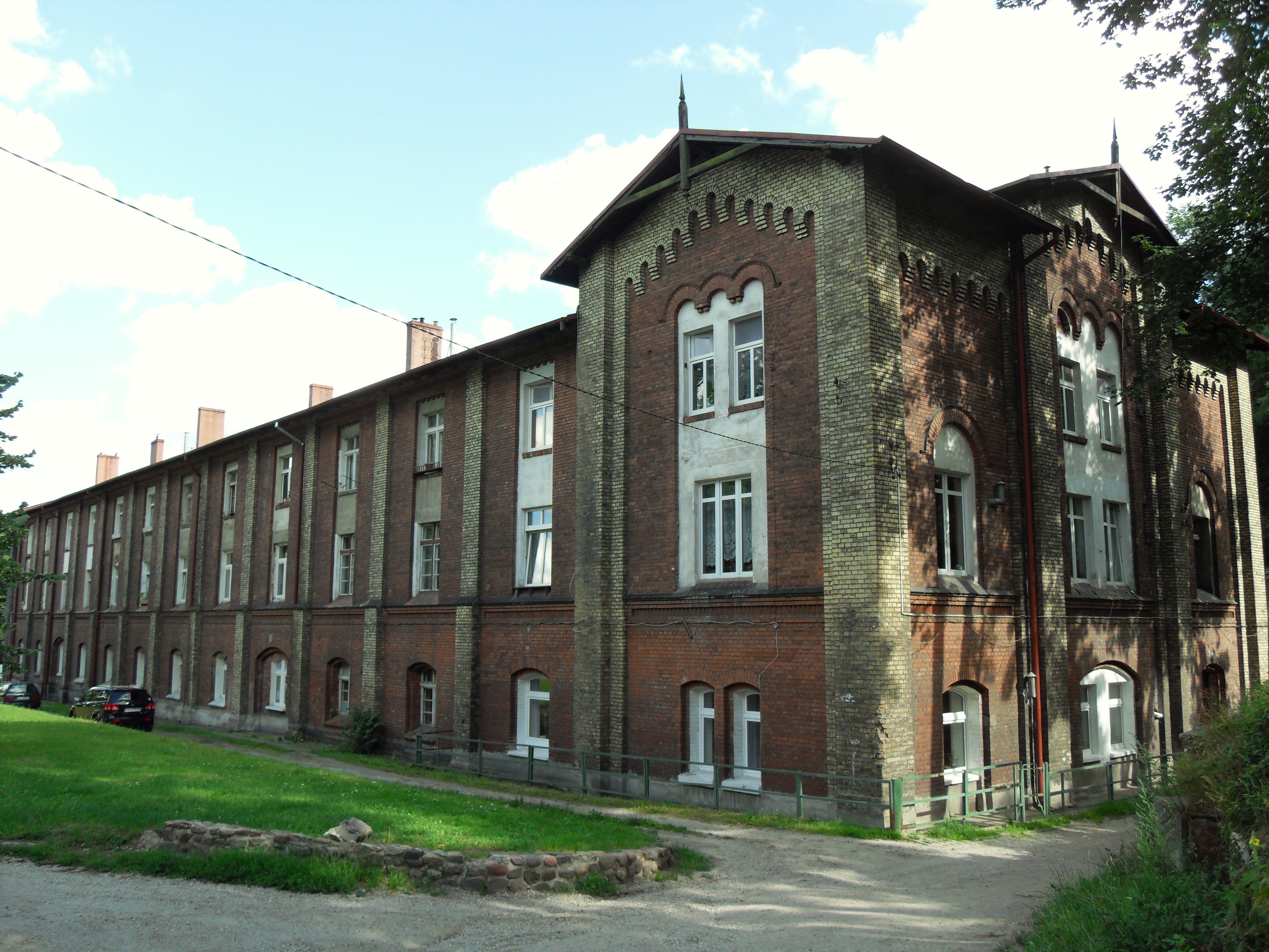 Gdańsk. Dawna zbrojownia w zespole umocnień nowożytnych przy ul. 3-go Maja 16.